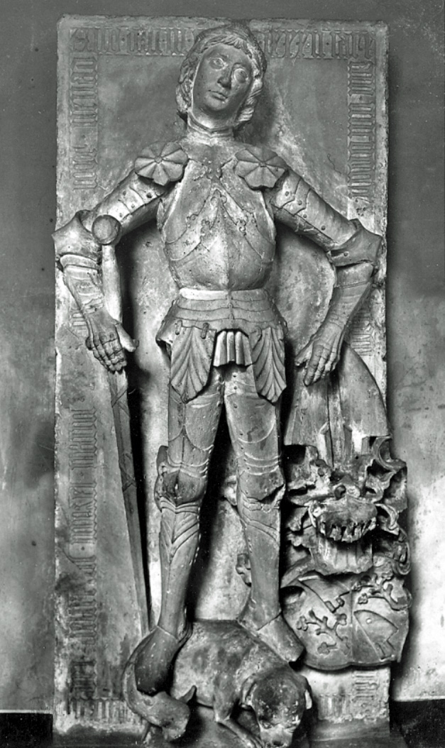 Grabplatte des Nickel Pflugk, ehemals in der Universitätskirche Leipzig, jetzt in der Thomaskirche Leipzig